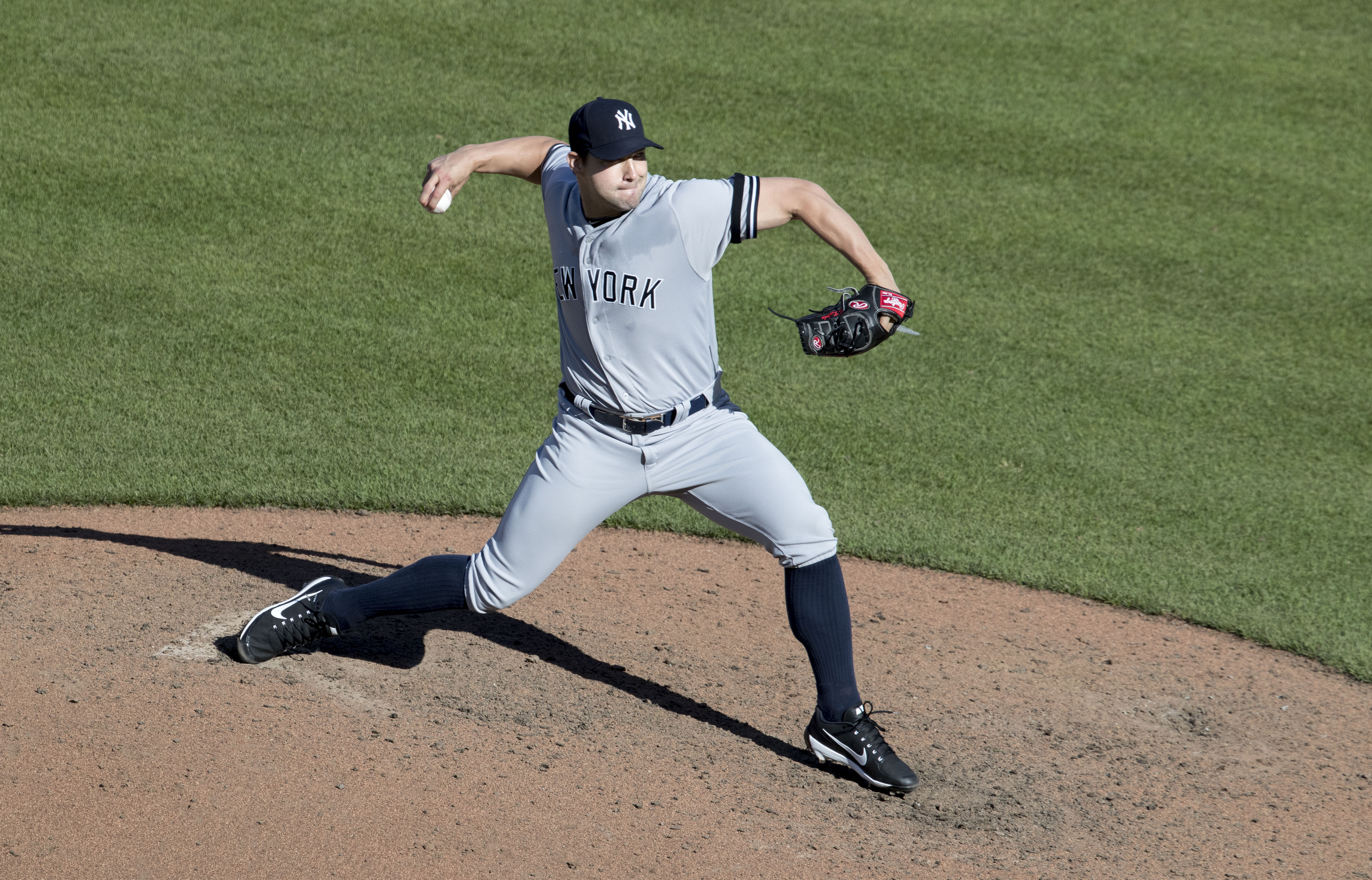 Yankees at Orioles 9/7/17